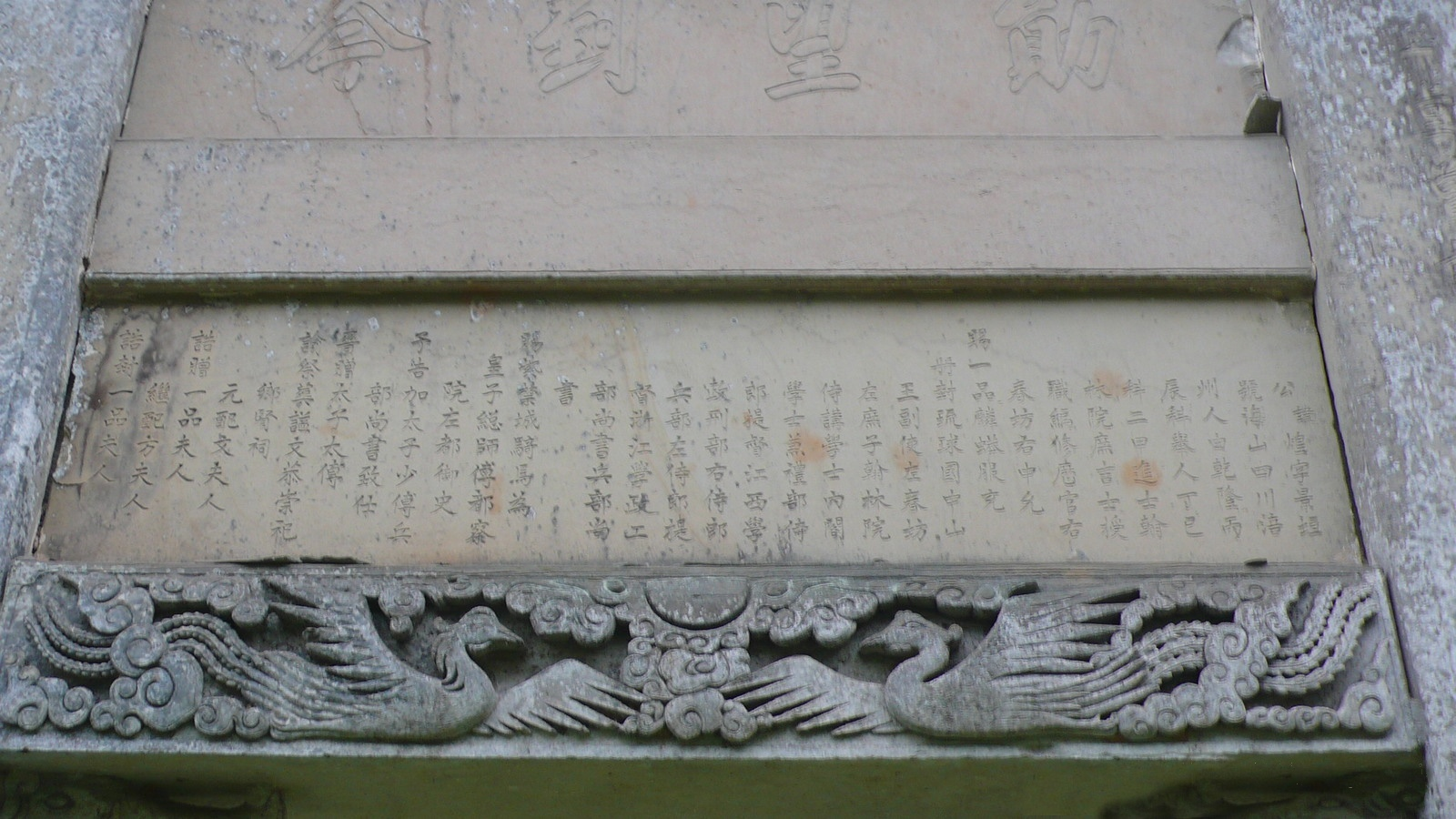 重慶涪陵周煌墓前牌坊銘文